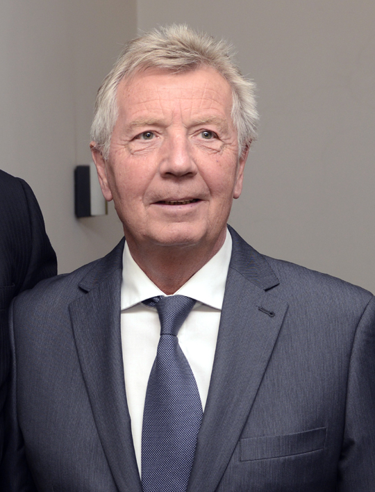 Ľubomír Roman